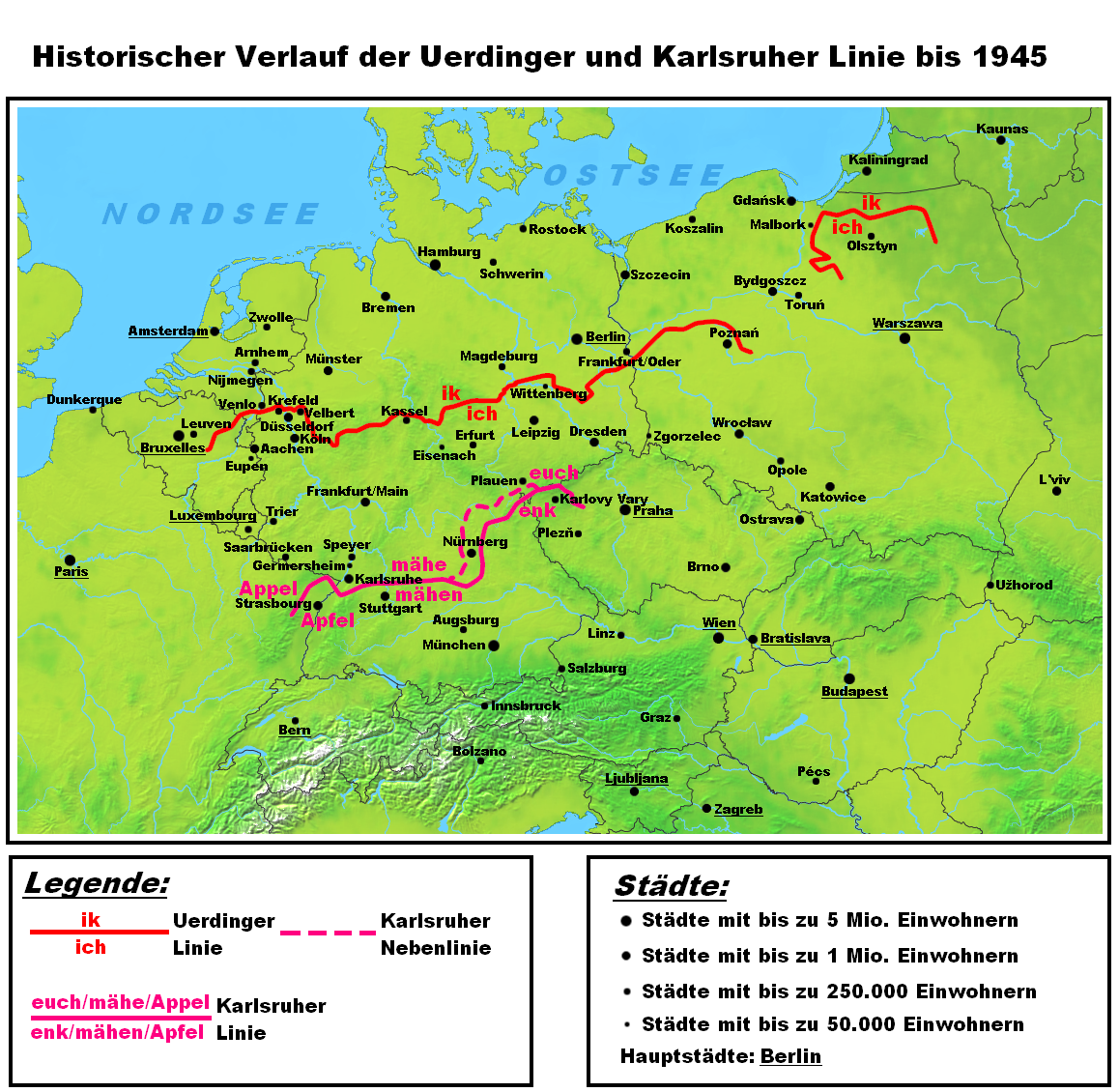 Darstellungskarte des historischen Verlaufes der Uerdinger und der Karlsruher Linie als alte Trenngrenze zwischen Nieder- und Mitteldeutsch. Die hochdeutschen Sprachinseln nördlich der Benrather Linie werden nicht dargestellt, da es sich hierbei nicht um das Ergebnis einer Lautverschiebung, sondern um spätere Siedlungsbewegungen von Süden nach Norden handelt. Es wurde auch bewusst auf die Darstellung jeglicher Sprachgrenzen verzichtet.